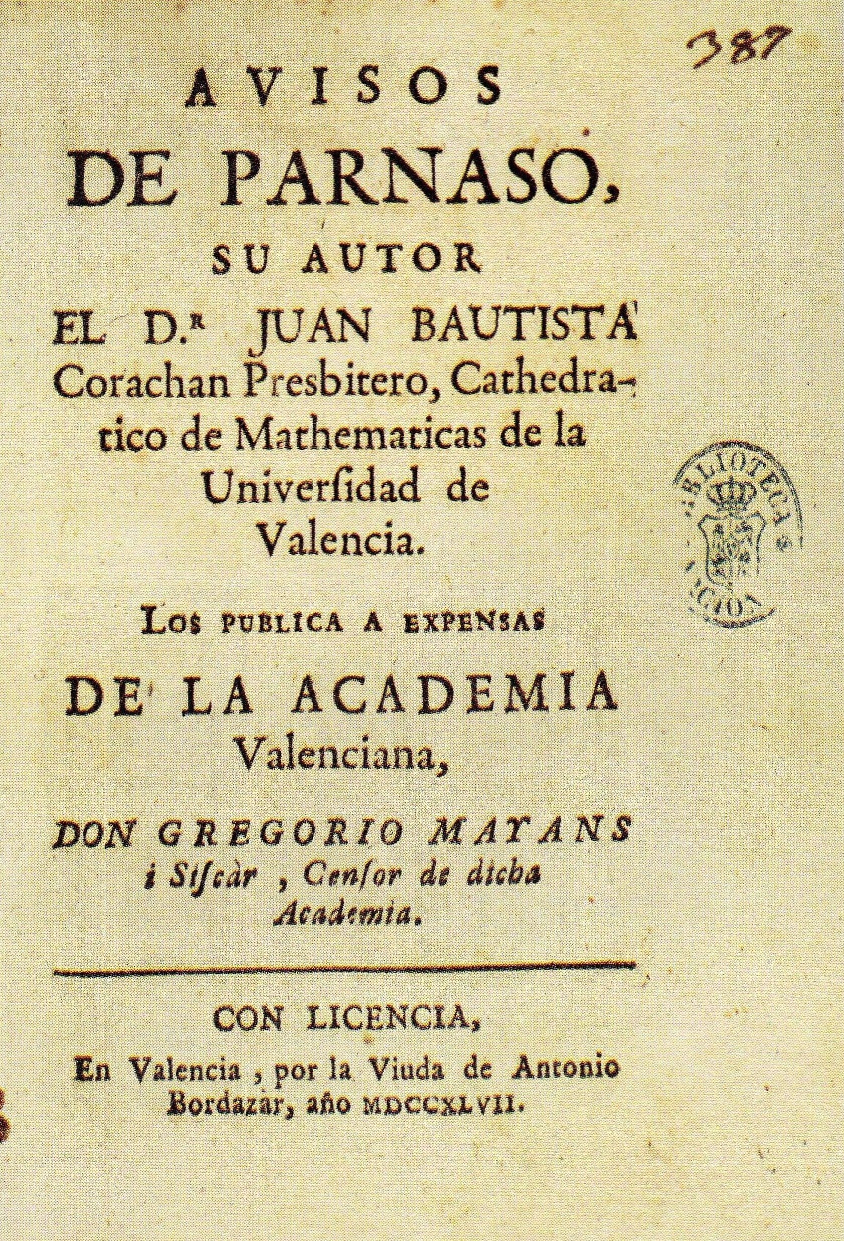 Avisos del Parnaso, obra del matemàtic valencià Joan Baptista Coratjà, editada per Gregori Maians i Ciscar el 1747.